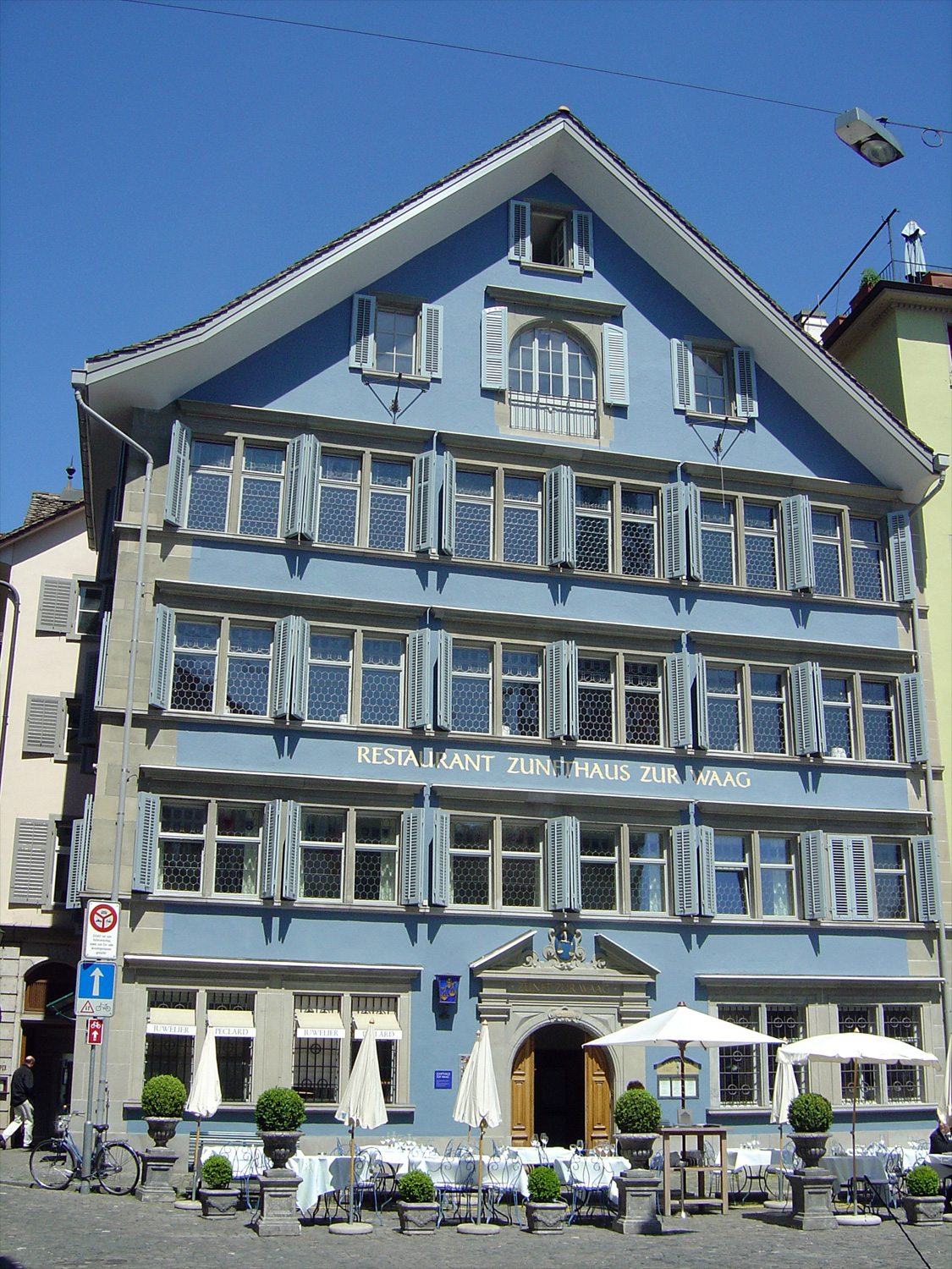 Das Zunfthaus zur Waag am Münsterhof in Zürich